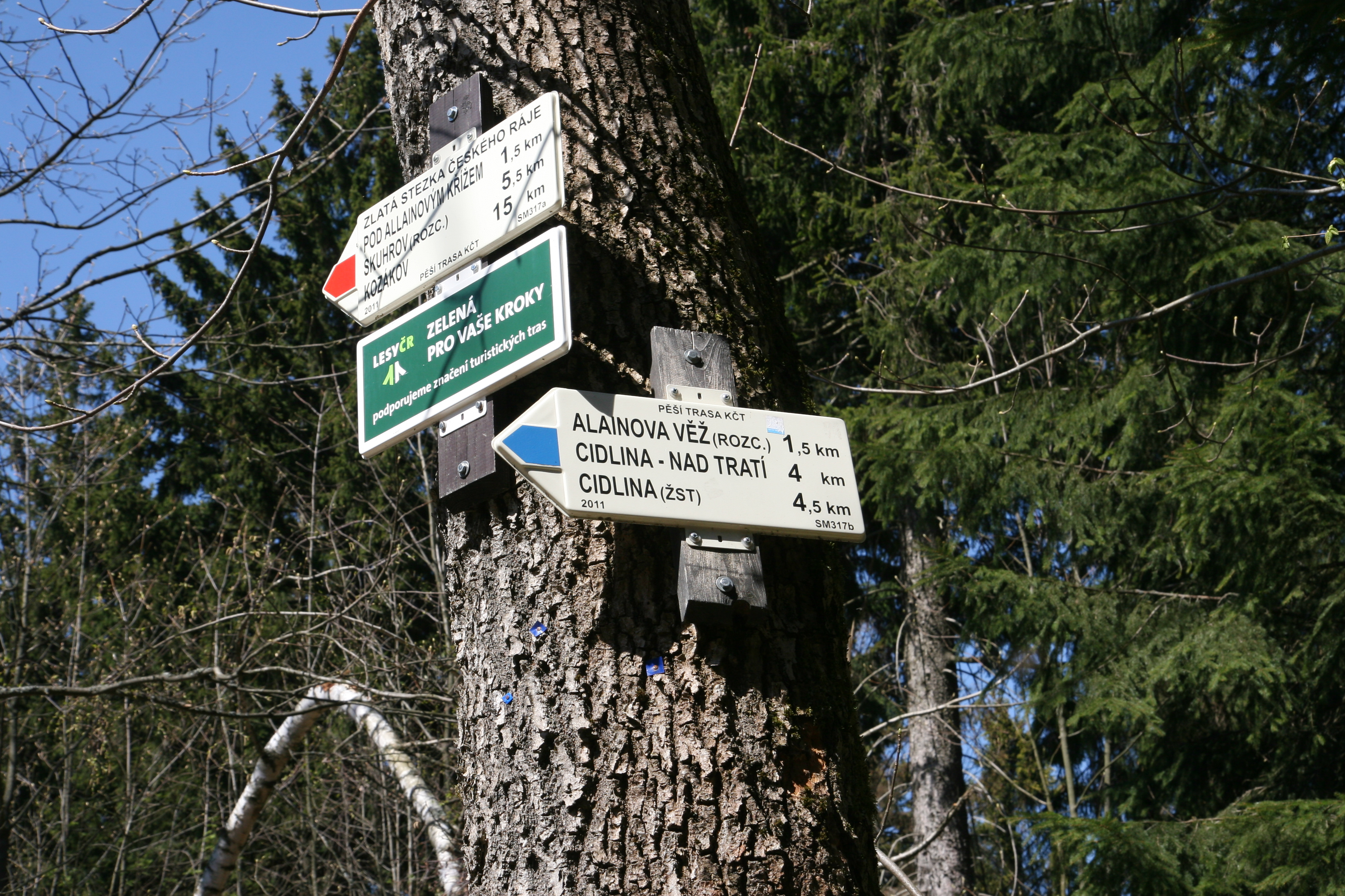 Turistický rozcestník na západním rozcestí na kopci Tábor, Lomnice nad Popelkou.